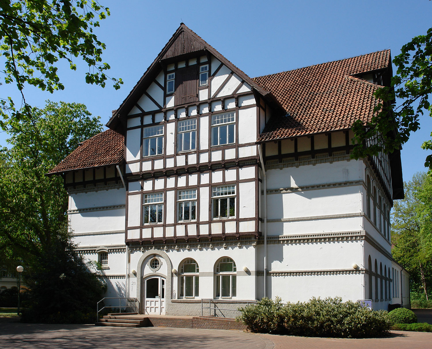 Klinikum Bremen-Ost, Haus 21. Ehemals St. Jürgen Asyl, Haus IX. Herstellung 1900–1904. Funktion: Kochküche Das abgebildete Objekt ist ein geschütztes Kulturdenkmal in der Freien Hansestadt Bremen, mit der Nr. 1664 beim Landesamt für Denkmalpflege registriert.